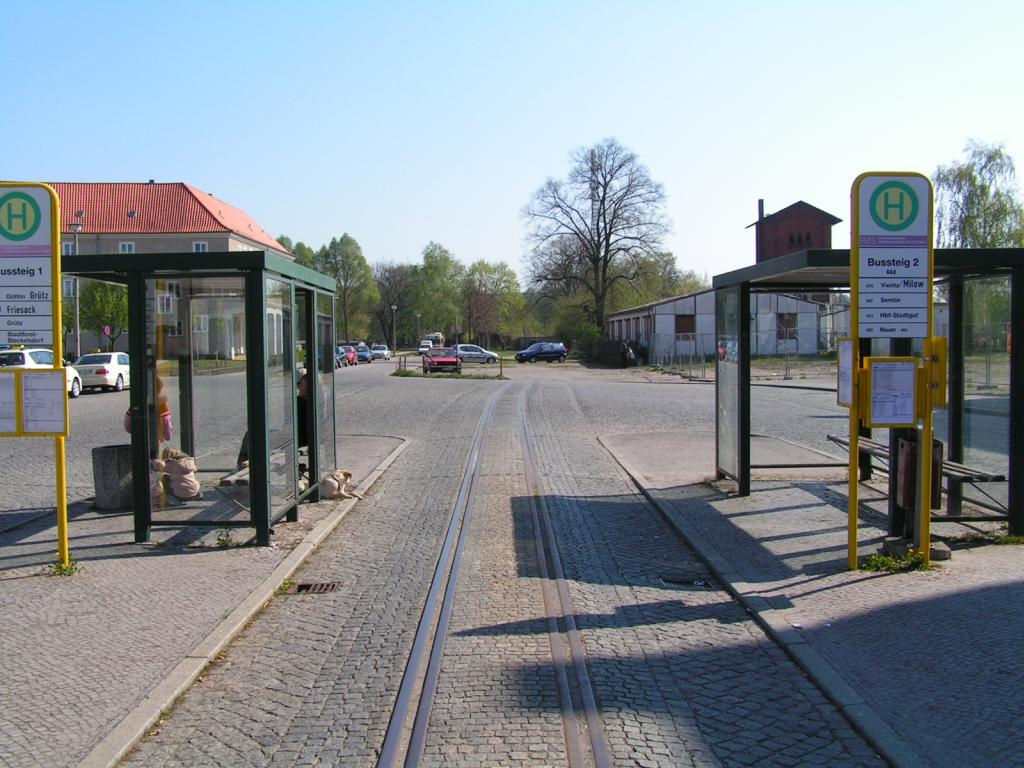 Gleise der Schmalspurbahn nach Nauen auf dem Bahnhofsvorplatz in Rathenow. Die Gleisreste stehen unter Denkmalschutz.